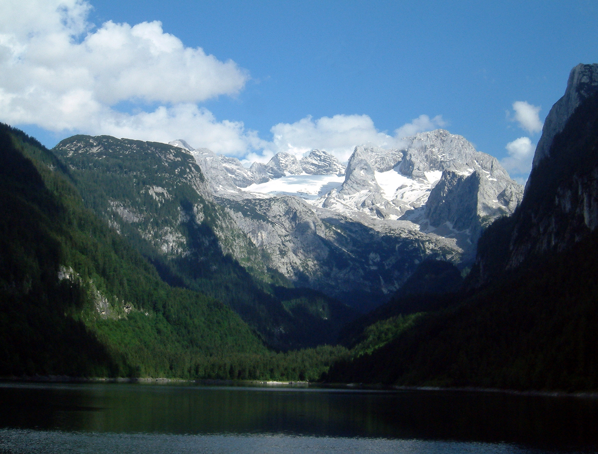 Dachstein in den Gemeinden Gosau, Hallstatt und Obertraun: Blick auf den Gosaukamm mit Vorderem Gosausee This media shows the nature reserve in Upper Austria with the ID n098.